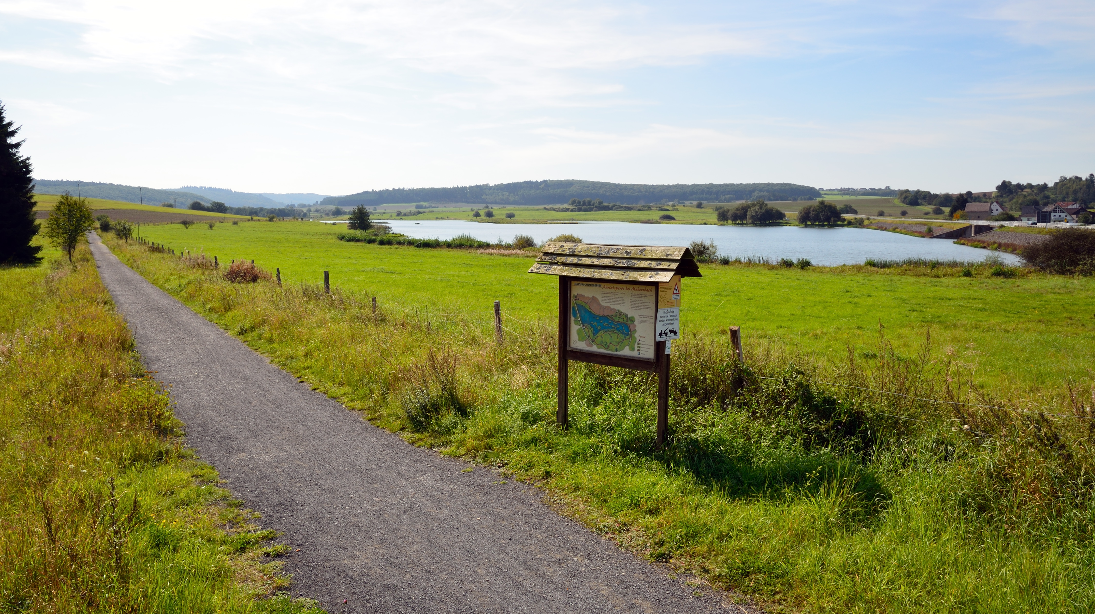 Aartalsee-Vorsperre, Naturschutzgebiet „Aartalsperre bei Mudersbach“